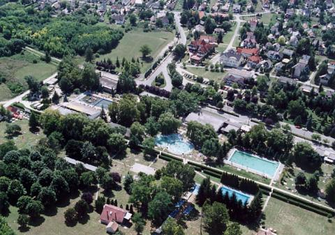 Igal, Hungary, aerialphotography